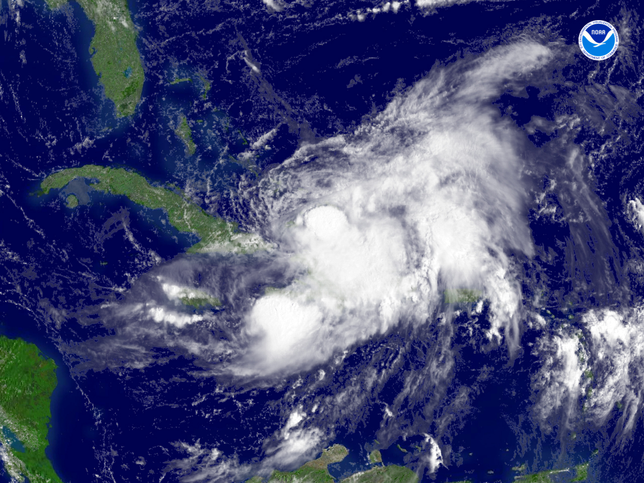 Hanna - Hi Res - Sept. 2, 2008